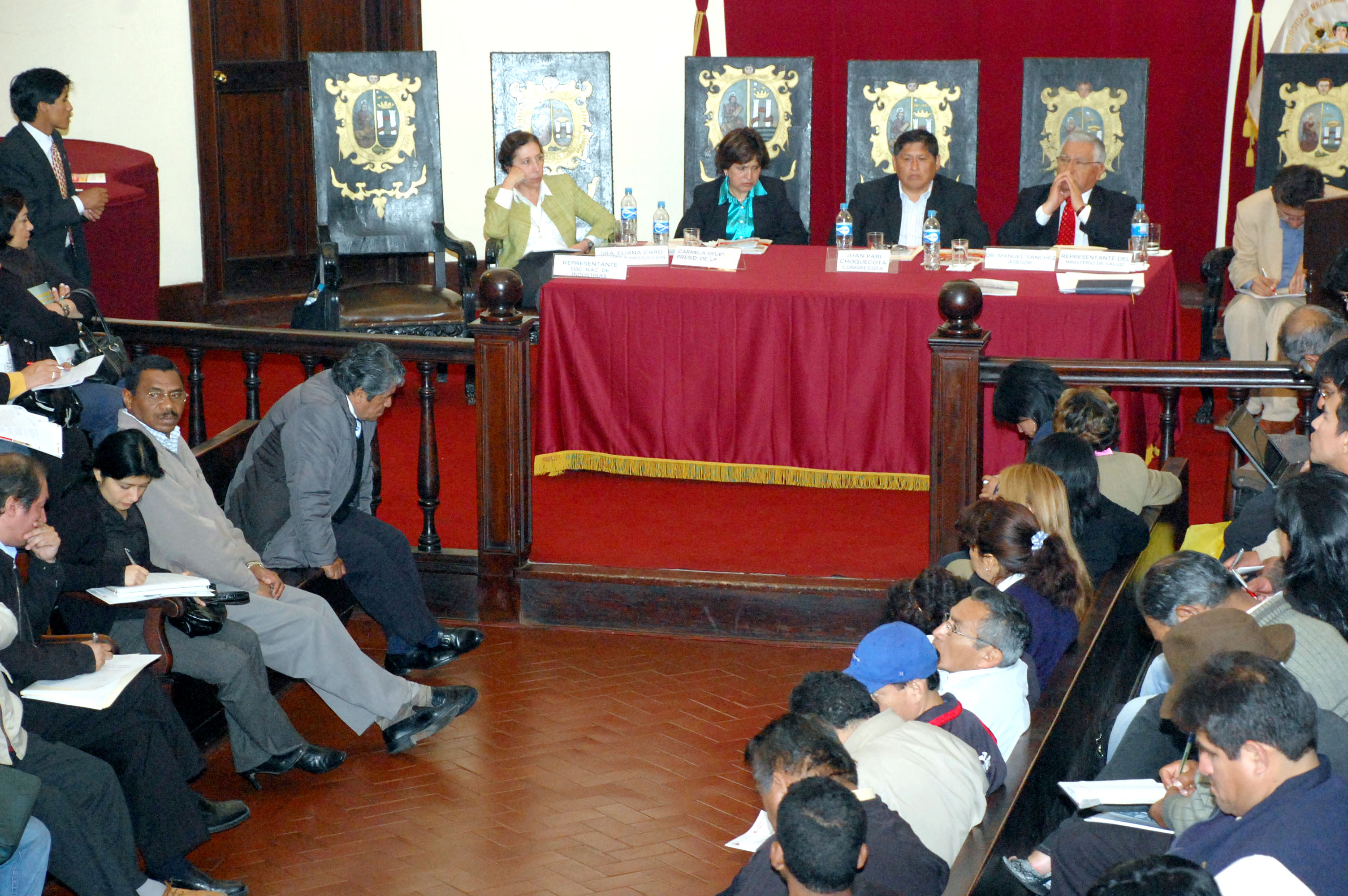 La Comisión de Trabajo, presidida por el congresista Juan Pari (GPN), realizó con la Confederación General de Trabajadores del Perú la audiencia pública "Por una Ley de Seguridad y Salud en el Trabajo" en la Casona de la Universidad de San Marcos.